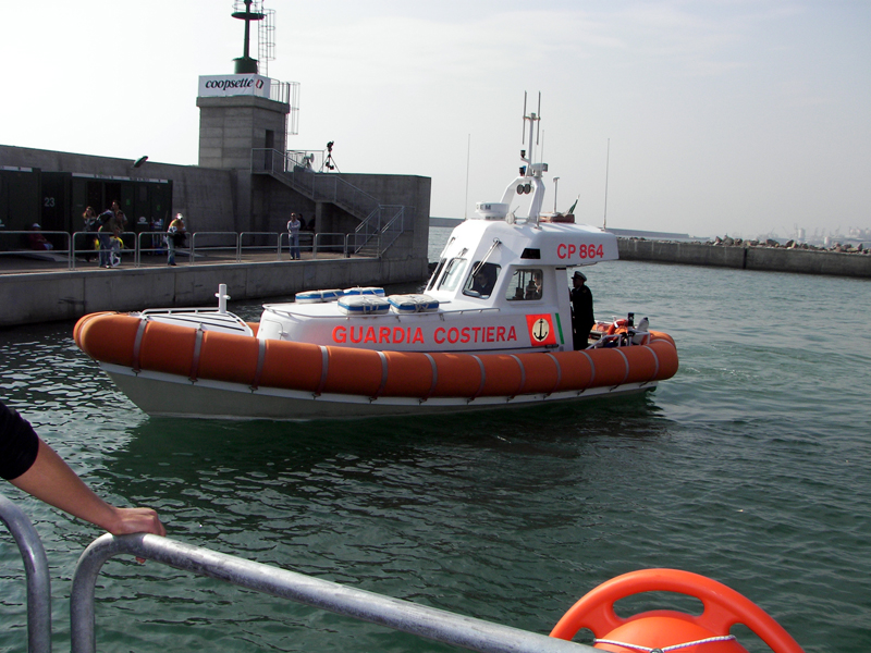 Motovedetta CP